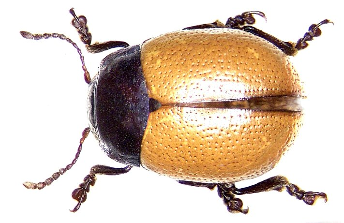 Familie: Chrysomelidae Grösse: 6,5 mm Verbreitung: Nordafrika Fundort: Algerien, Guelt-Es-Stel, Gourz en Naam, 1000 m leg. U.Eitschberger; det. Kippenberg Foto: U.Schmidt, 2005